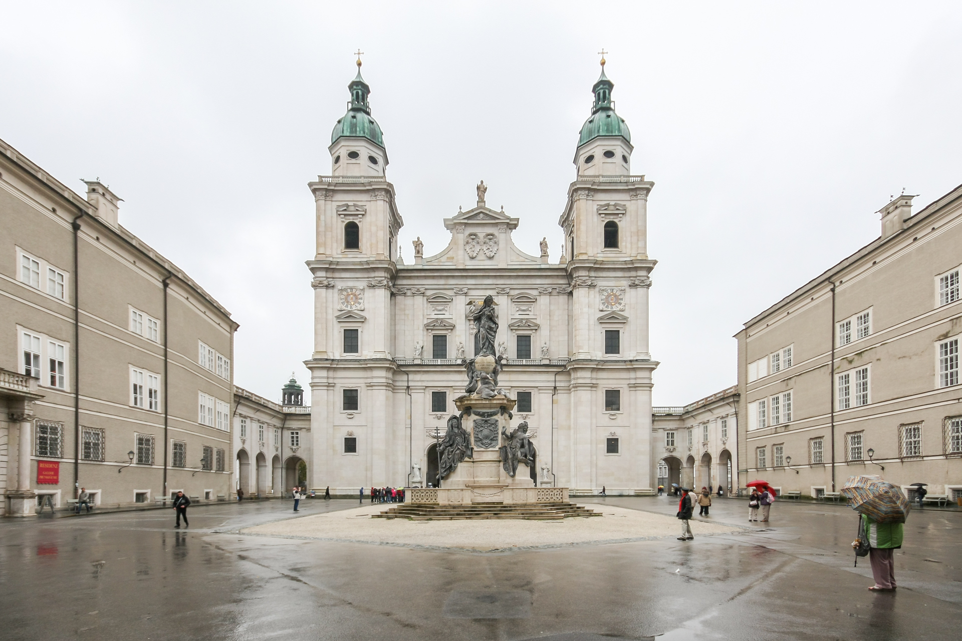 Die Fassade des Salzburger Doms am Domplatz. Davor die Mariensäule. Zwischen allen Gebäuden besteht eine begehbare Verbindung, die im Rahmen eines Besuches des Museumskomplexes DomQuartier allen offensteht.